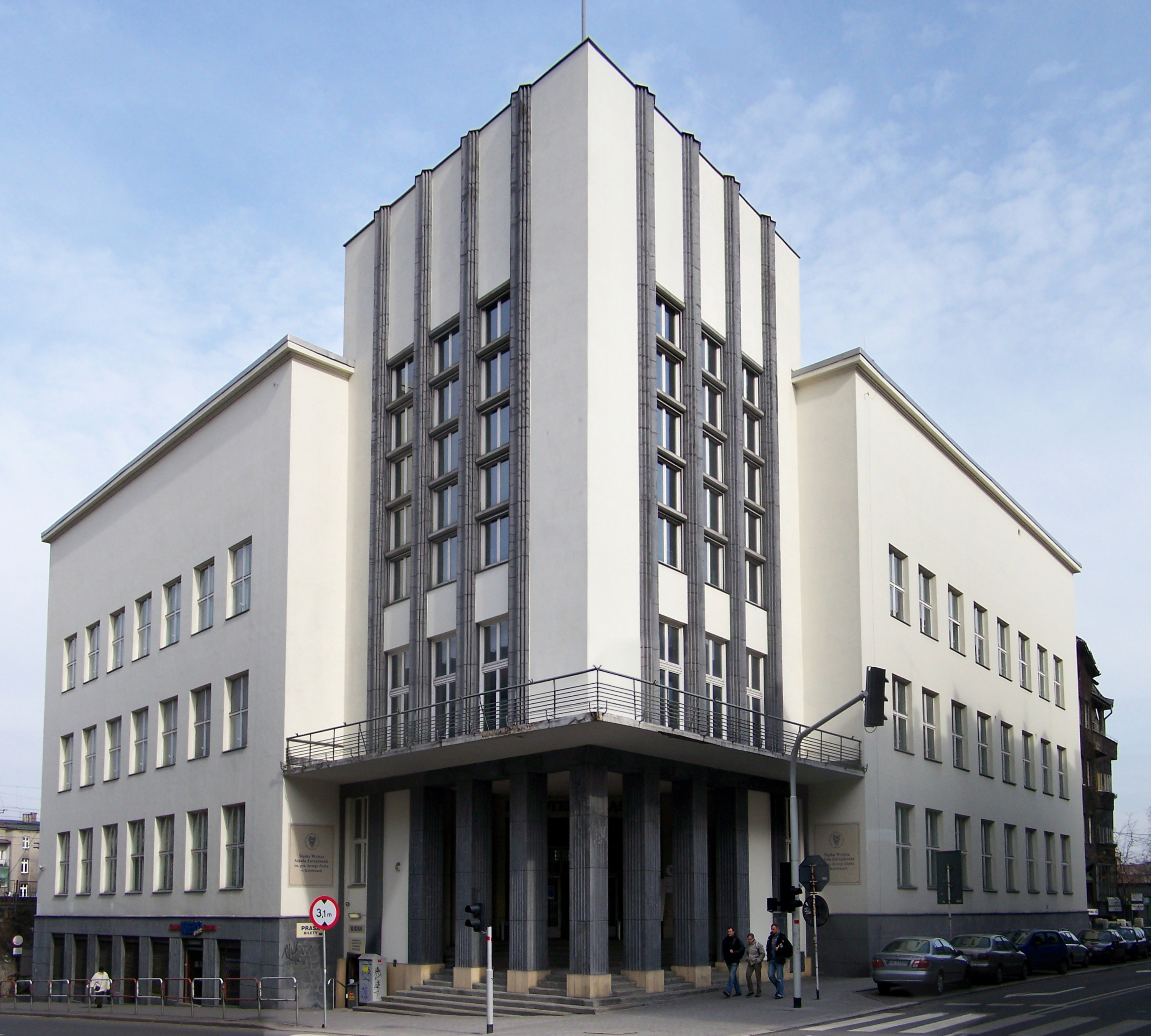 Budynek Śląskiej Wyższej Szkoły Zarządzania przy ulicy Francuskiej 12 w Katowicach. Budynek został wybudowany z inicjatywy Towarzystwa Czytelni Ludowych i oddany do użytku w 1934 r. Zaprojektowali go arch. S. Tabeński i J. Rybicki. W latach 1957-75 mieściła się tu siedziba Śląskiego Instytutu Naukowego a potem siedziba Biblioteki Śląskiej.